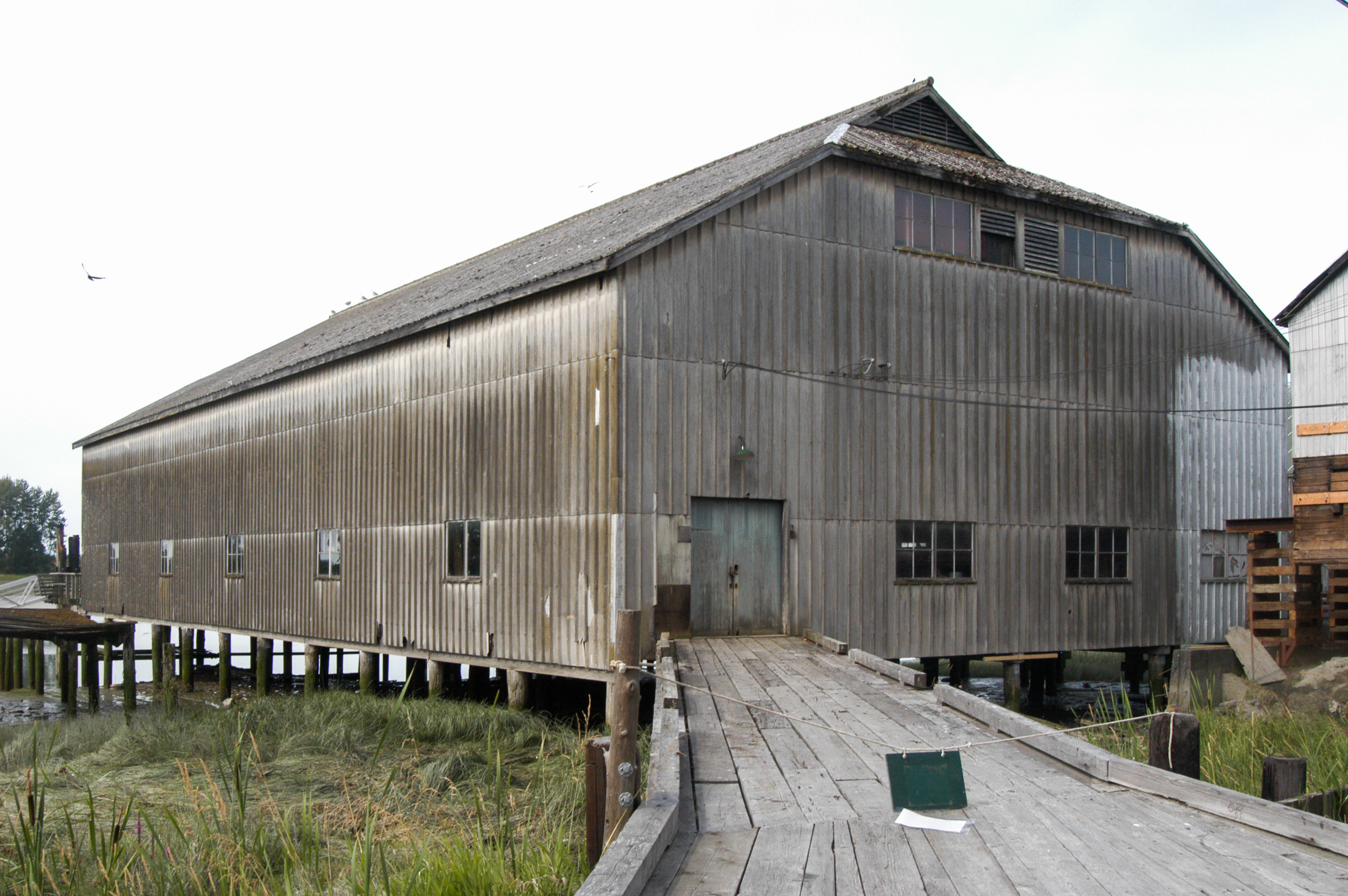 Bâtiment du chantier naval aperçu dans l'épisode 5, L'expérience secrète de la Saison 6 de Stargate SG-1.